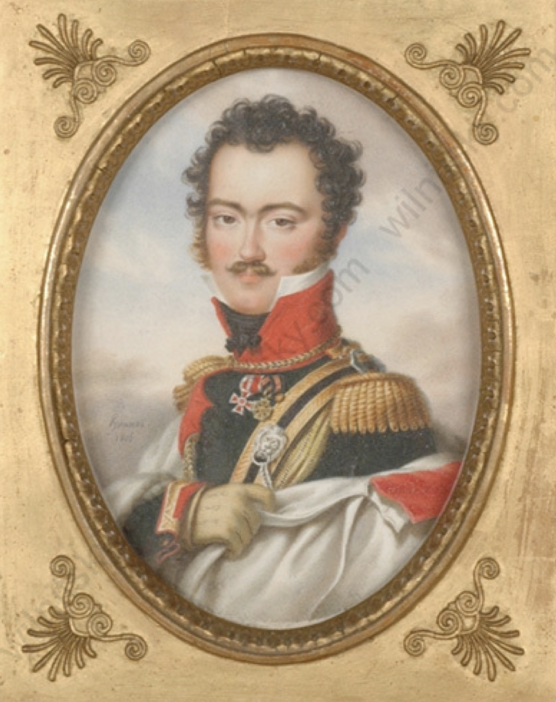 Carl Hummel, Graf Eugen Wratislaw von Mitrowitz, Aquarell auf Papier, 13,9 x 10,0 cm (ohne Rahmen), signiert: "Hummel 1816"